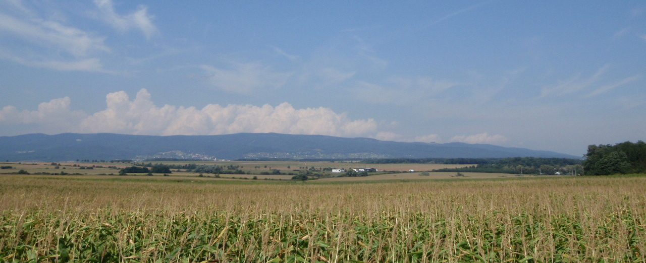 Günser Gebirge aus richtung Narda